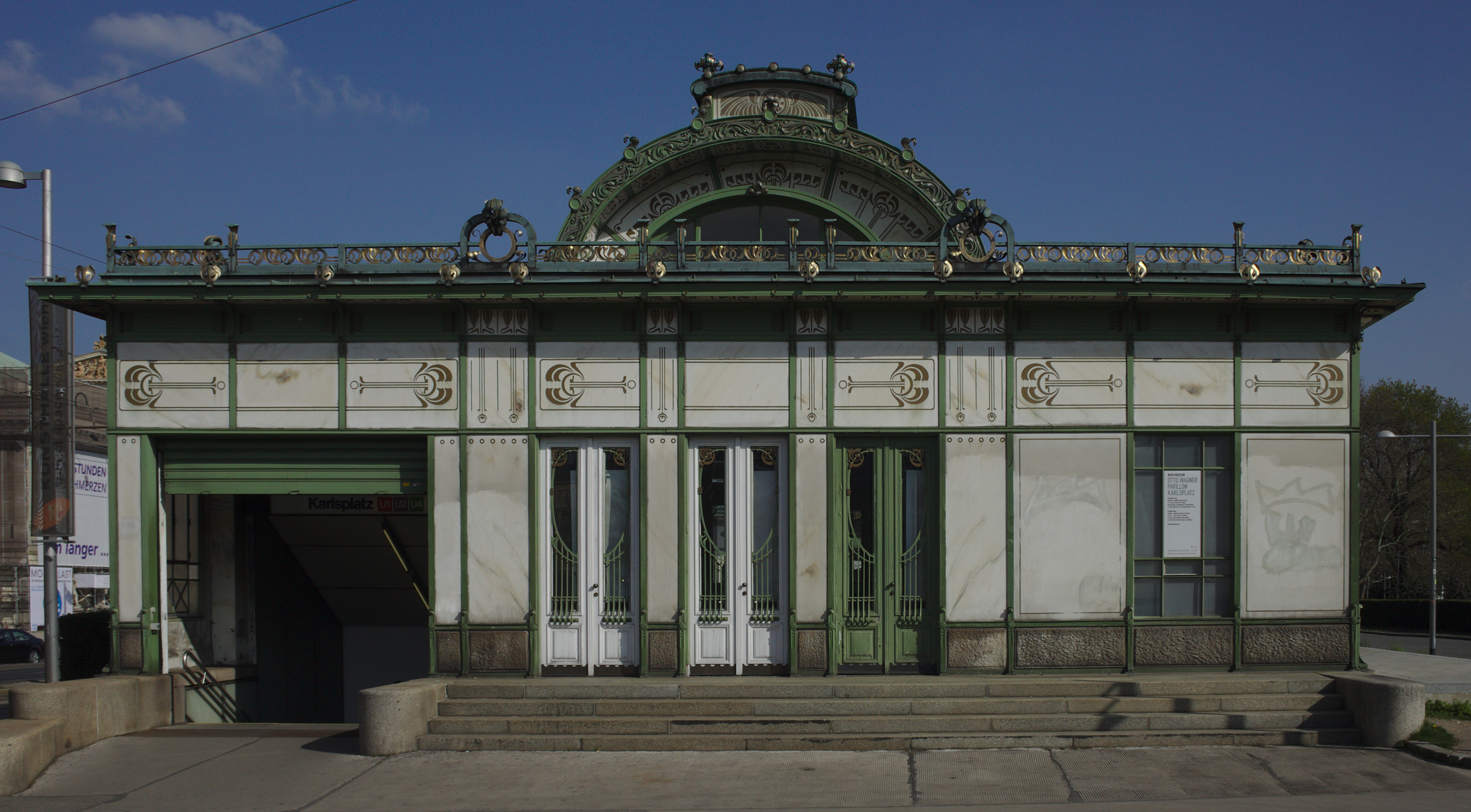 Karlsplatz 2 Pavillons und Teilabschnitt der ehem. Stadtbahn